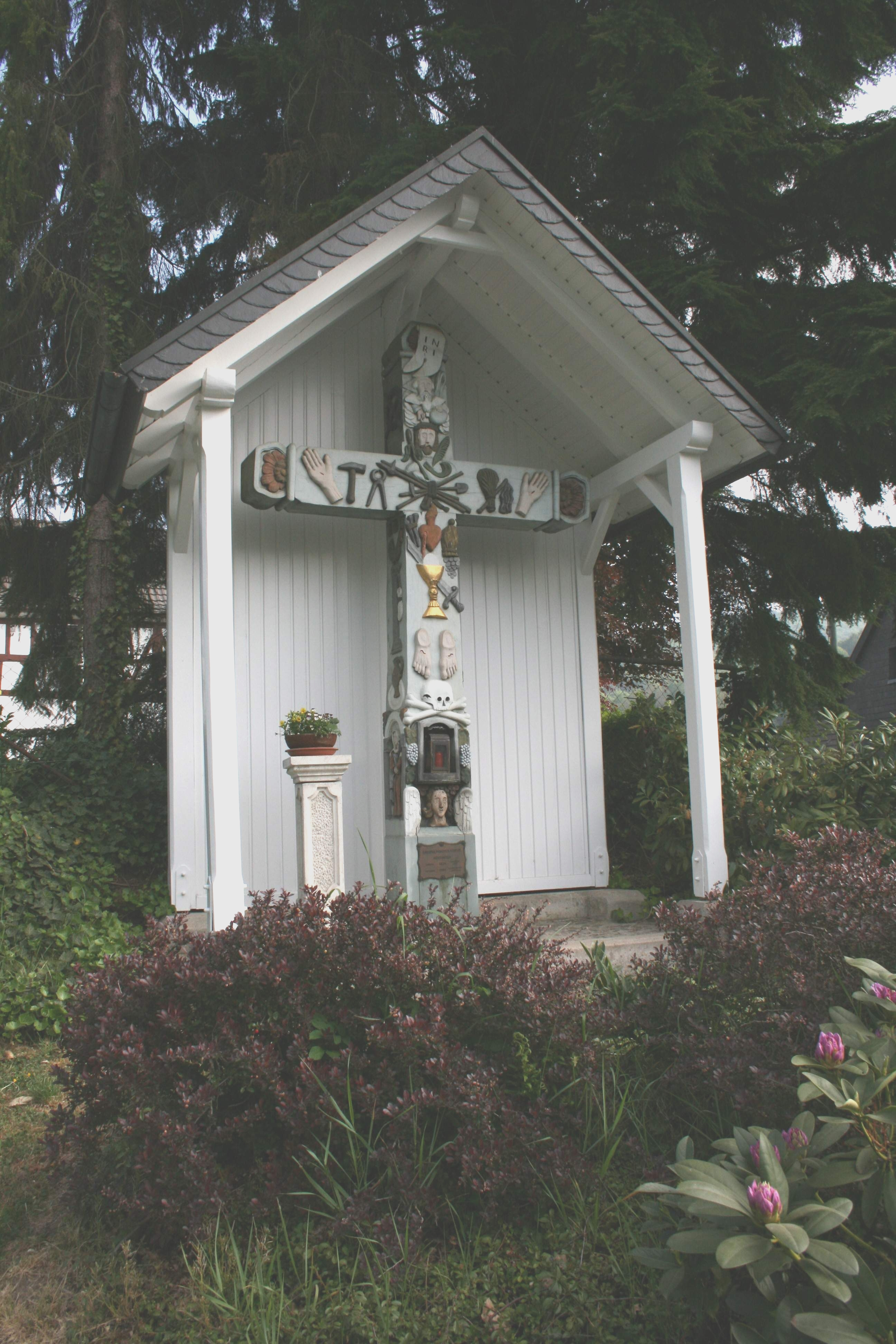 Dreifaltigkeitskreuz in Eitorf-Koettingen